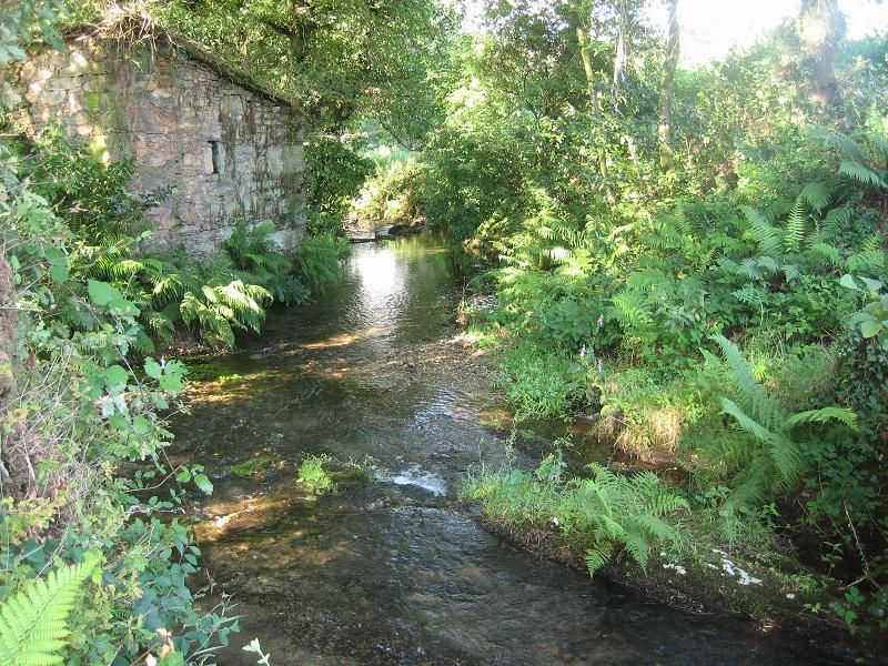 Primeiro muíño do Río Sarela, perto do seu nacemento. Parroquia da Peregrina, concello de Santiago de Compostela.